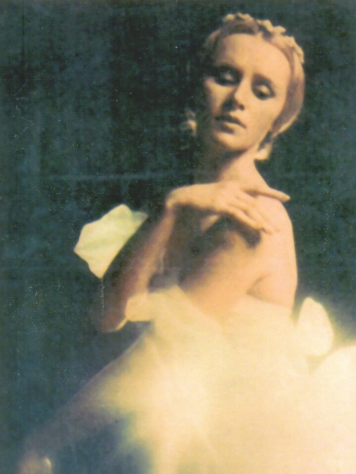 загуменникова ольга балерина